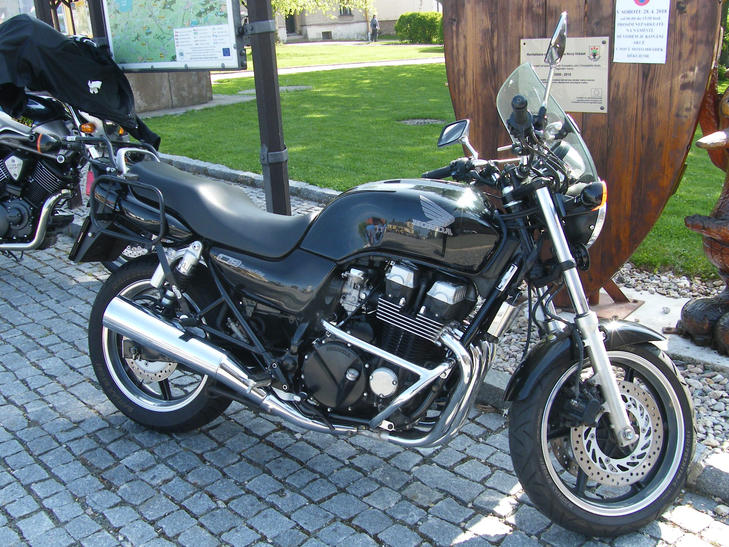 Honda CB 750